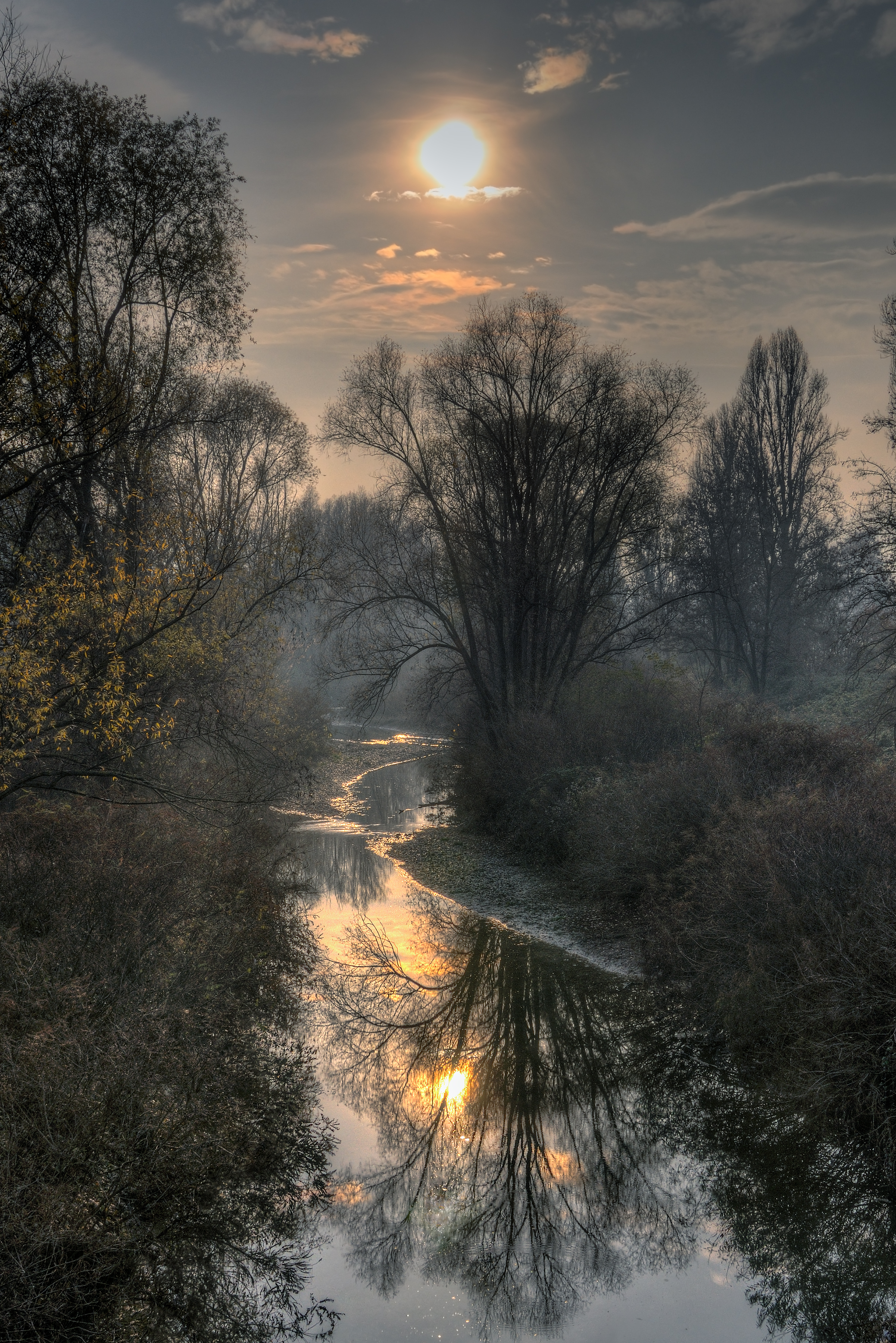 Torrente Tresinaro - Fellegara, Scandiano, Reggio Emilia, Italia